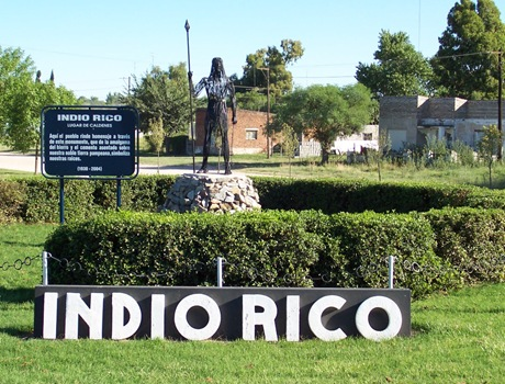 Monumento al Indio.Emblema de la Localidad Realizado en hierro.